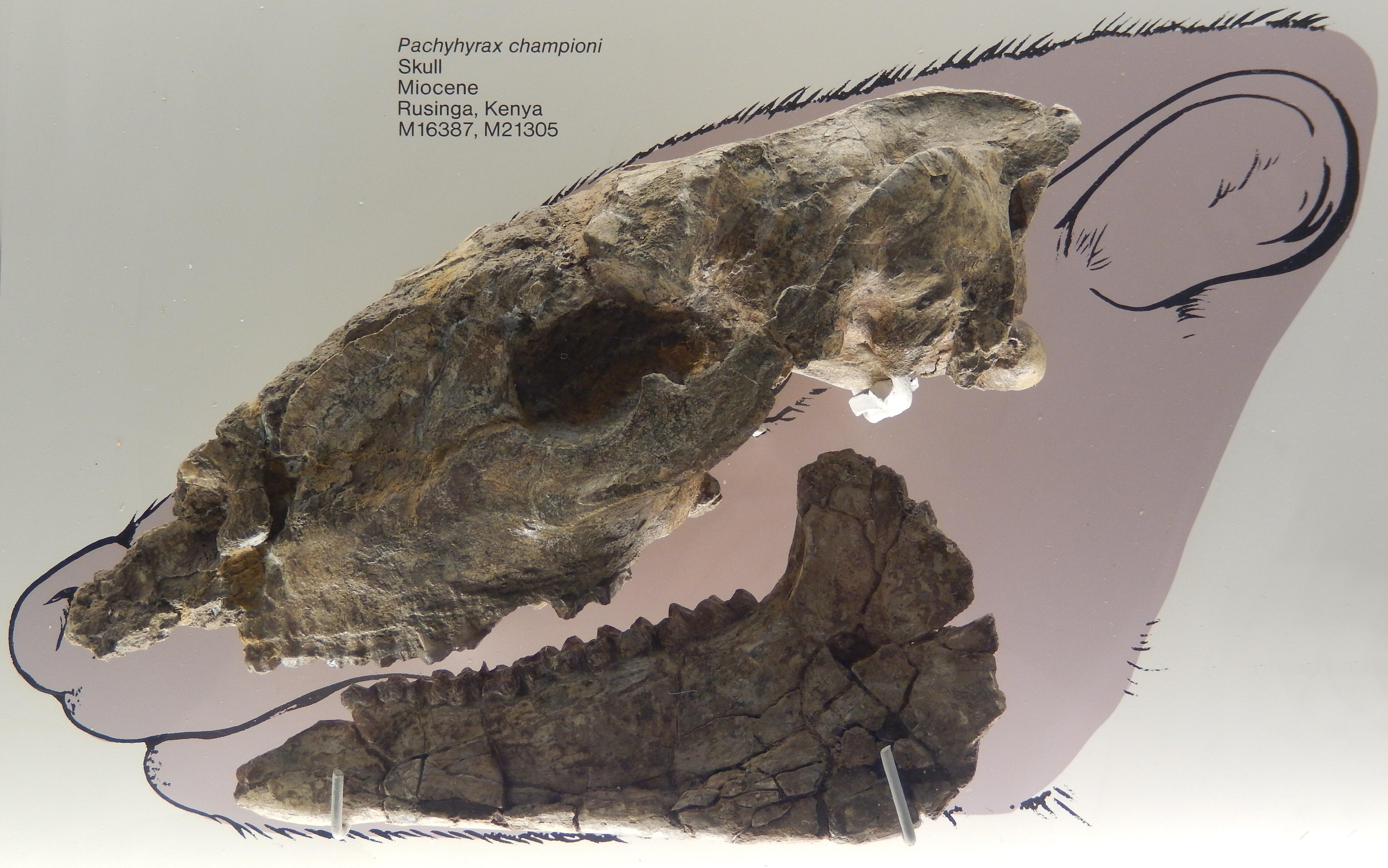 Fossil of Pachyhyrax championi, an extinct mammal -- Took the photo at Natural History Museum, London